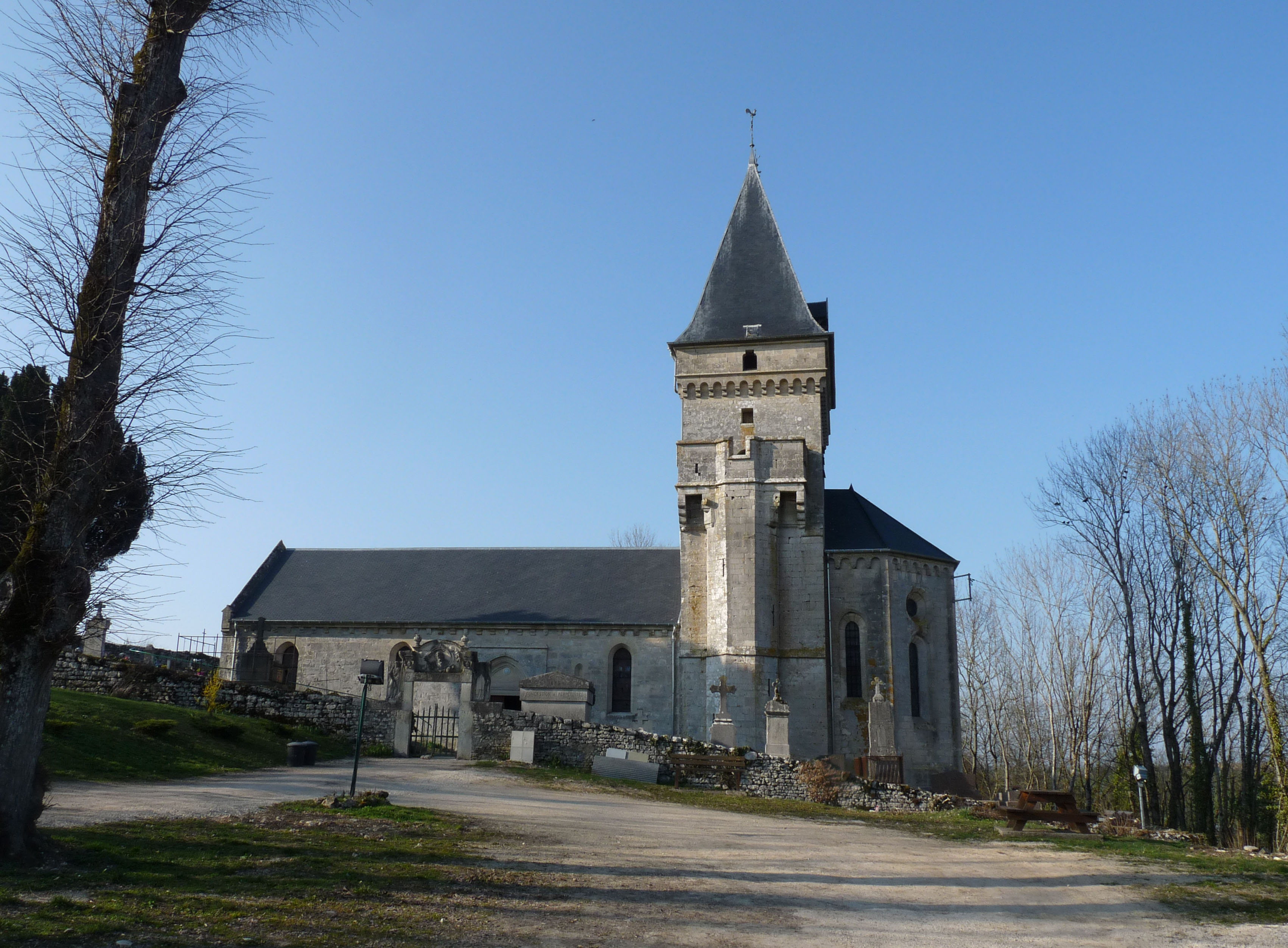 Eglise de Ribeaucourt (Meuse)